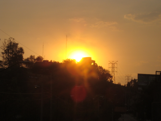 El atardecer, son esos segundos en los que la luz va desapareciendo y los colores del cielo se transforman en miles de tonos violetas y rojizos.